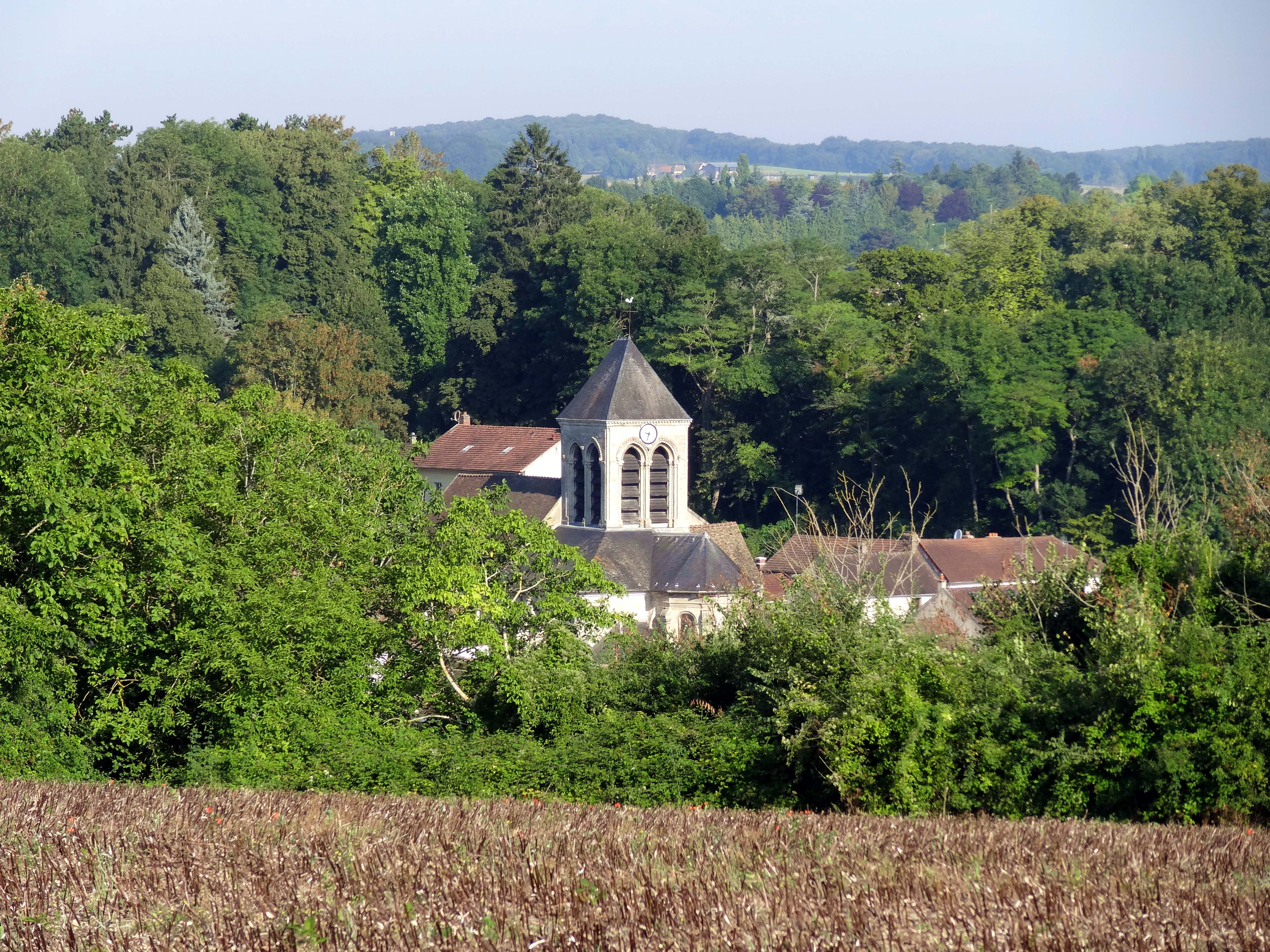 Église Saint-Séverin d'Oinville-sur-Montcient - voir titre.